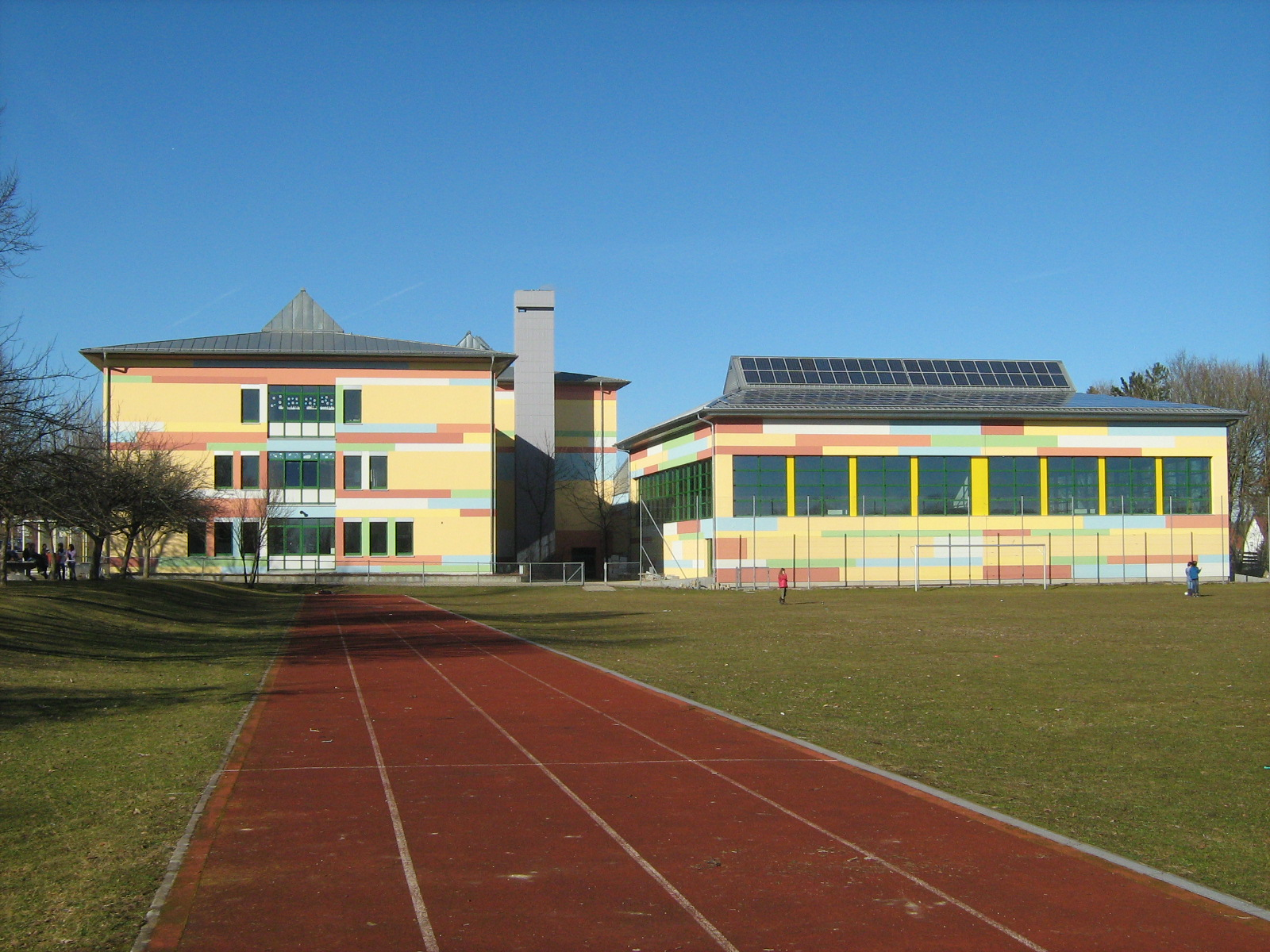 Volksschule Altomünster (Grund- und Hauptschule in Altomünster im Landkreis Dachau - Bayern) / Süd-Ansicht